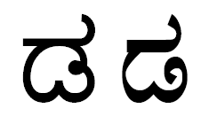 дакараву